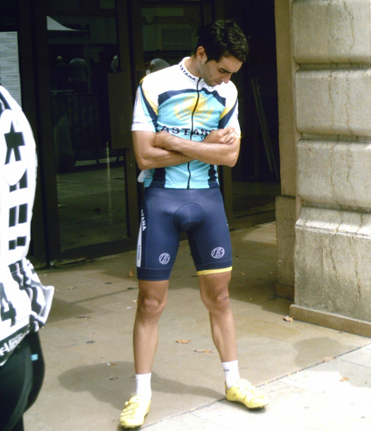 Daniel Navarro lors de la signature préalable au départ de la première étape du Tour de l'Ain 2009